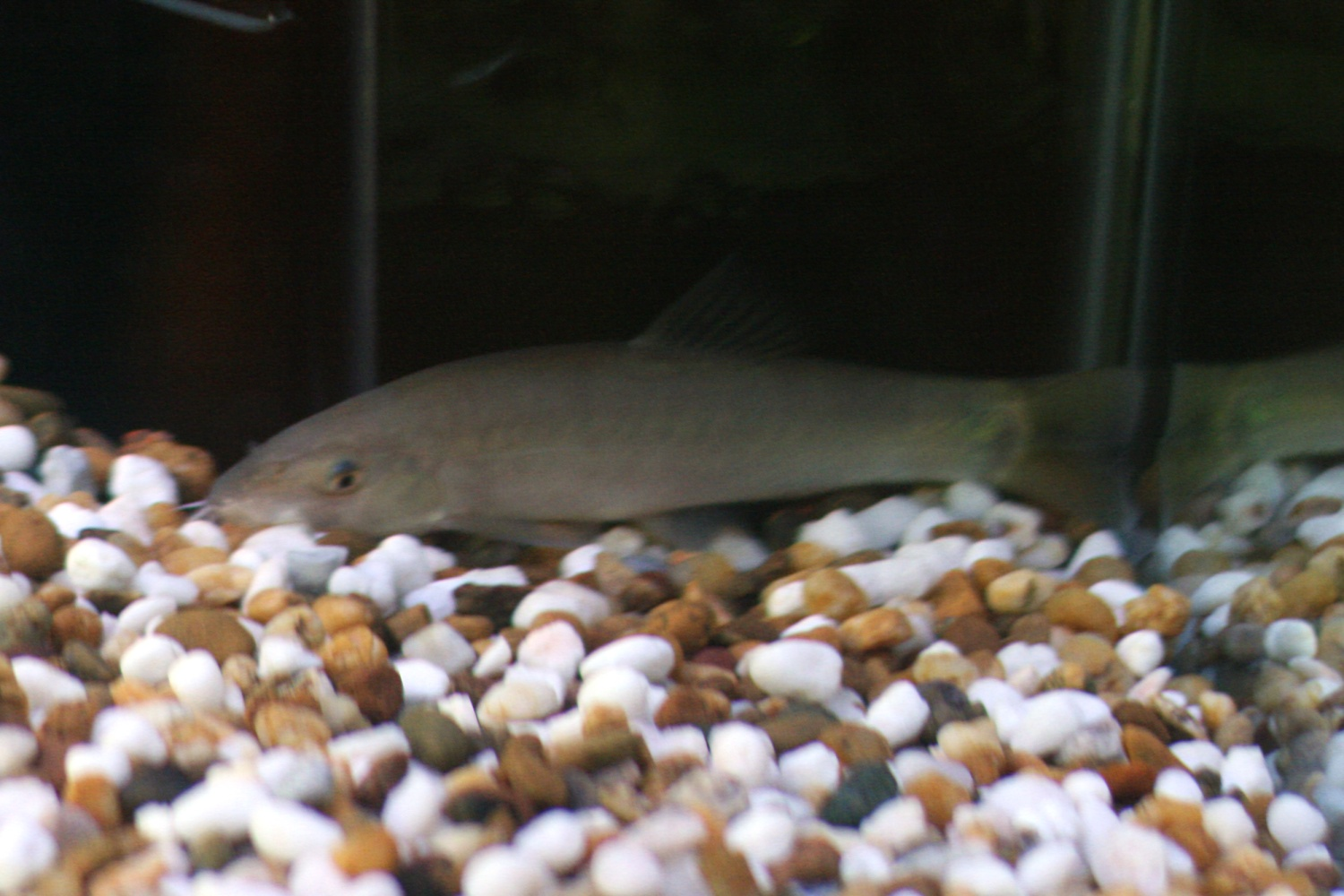 Yasuhikotakia eos. Size about 8cm SL.